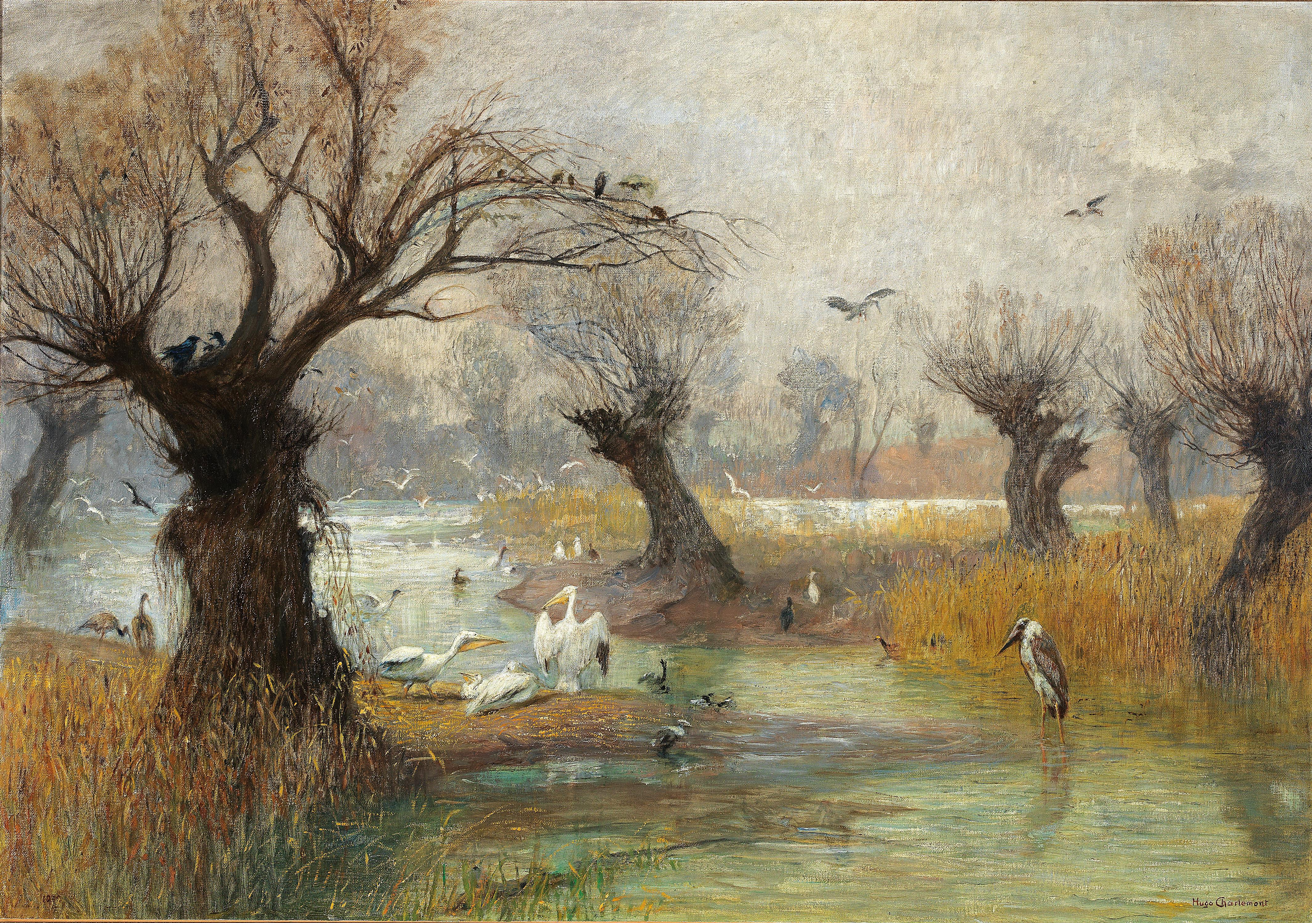 Pelikane am Flussufer, signiert Hugo Charlemont, Öl auf Leinwand, 70 x 100 cm